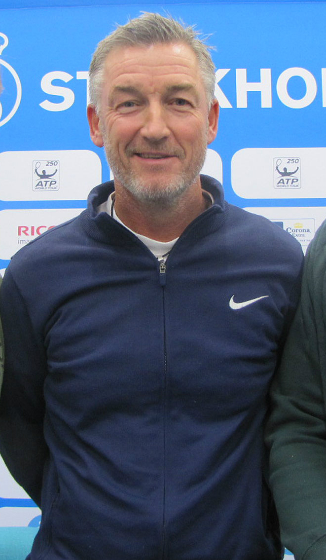 Fredrik Rosengren från Stockholm Open